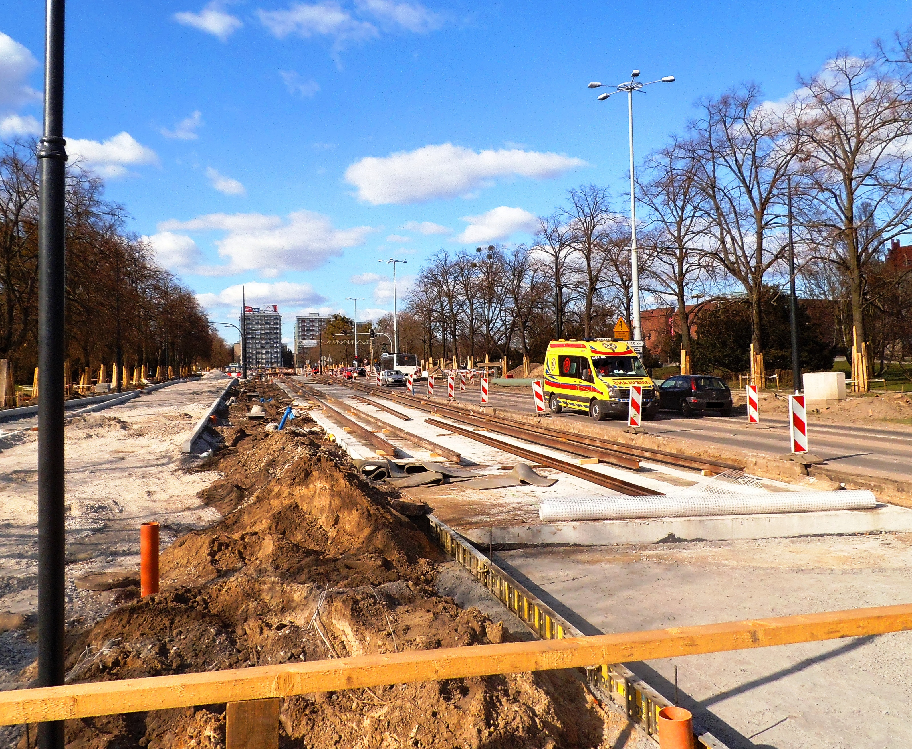 Aleja Jana Pawła II w Toruniu, marzec 2020